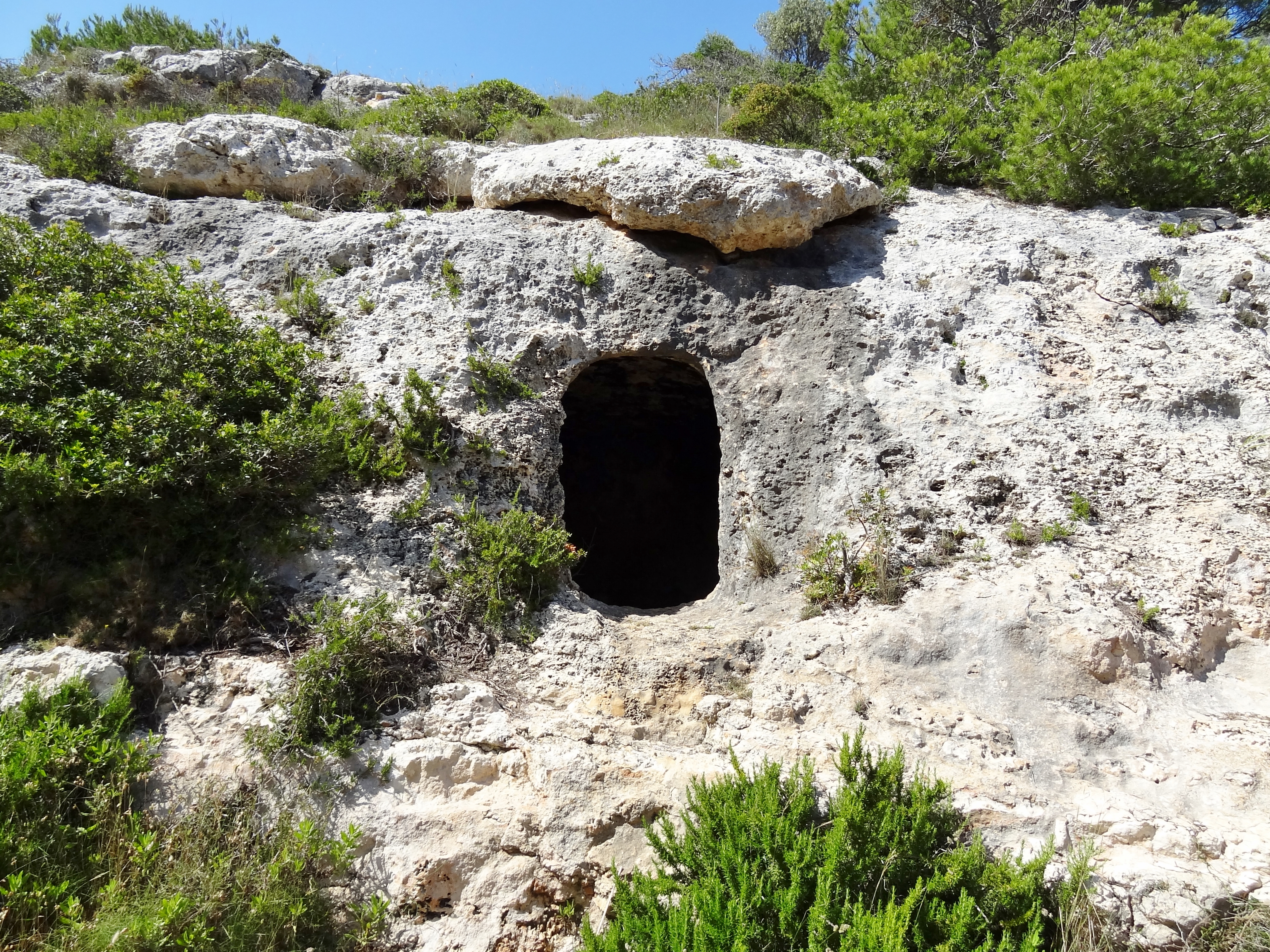 Kleine Höhle vor der Cala Bóta, Gemeinde Manacor, Mallorca, Spanien